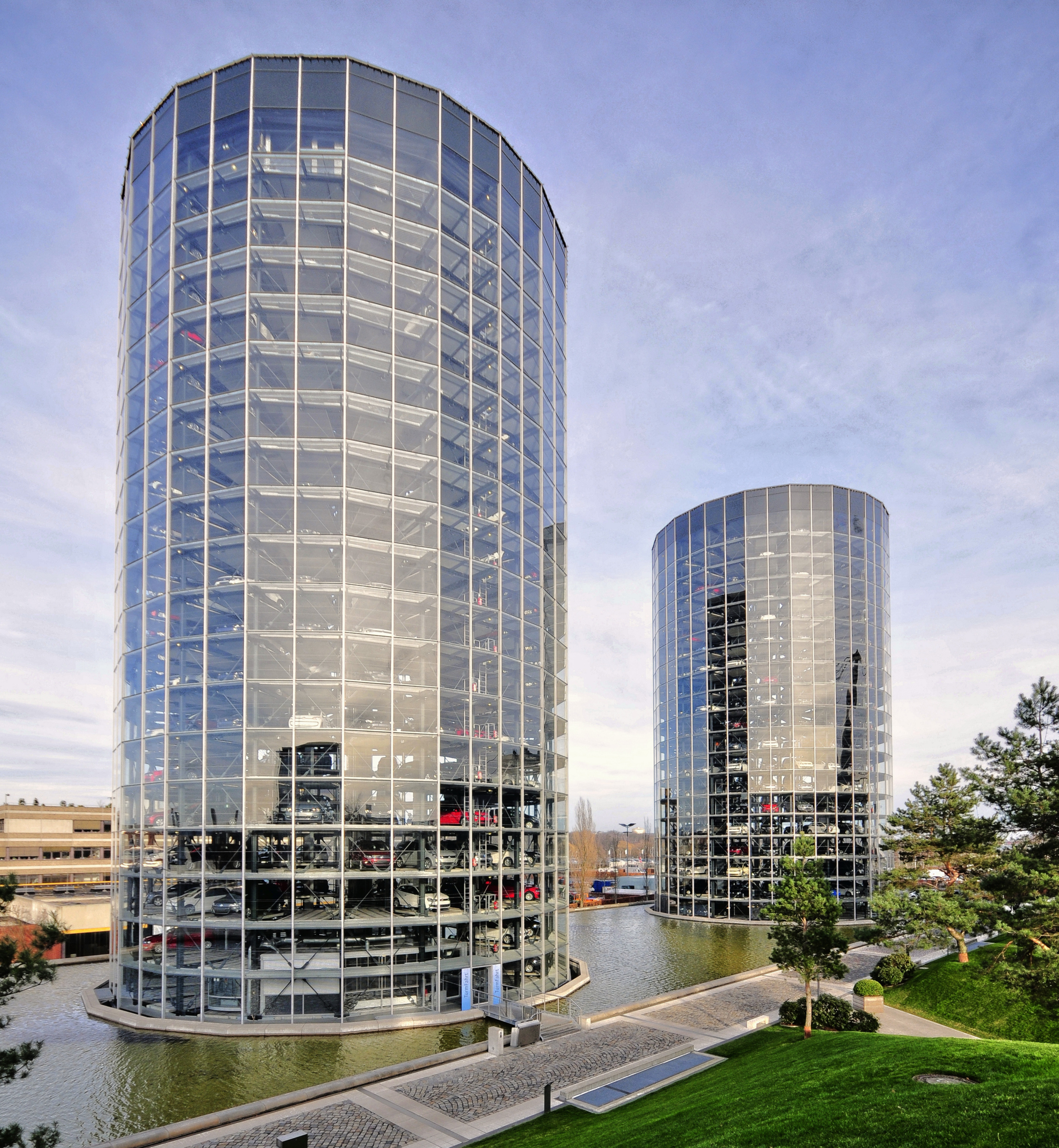 Autostadt Wolfsburg